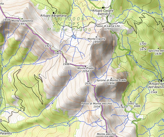 carte réalisée sur umap This map may be incomplete, and may contain errors. Don't rely solely on it for navigation.